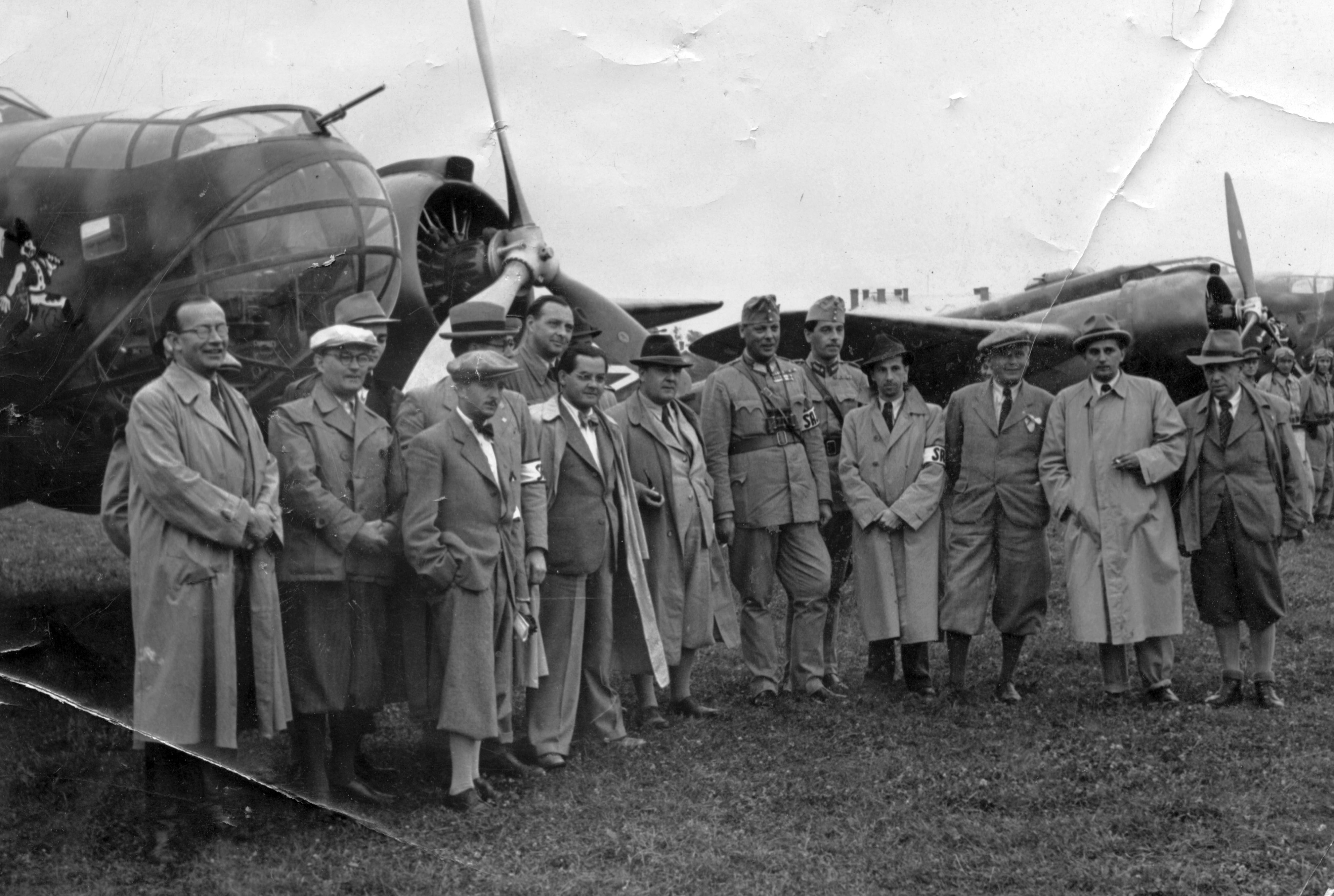 A debreceni 3/6. "Uz Bence" bombázószázad Caproni Ca-135 bis bombázógépe. Tags: Royal Hungarian Air Force, airplane, Caproni-brand, tableau, airport Title: A debreceni 3/6. \